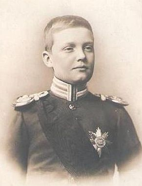 Kronprinz Georg von Sachsen um 1905